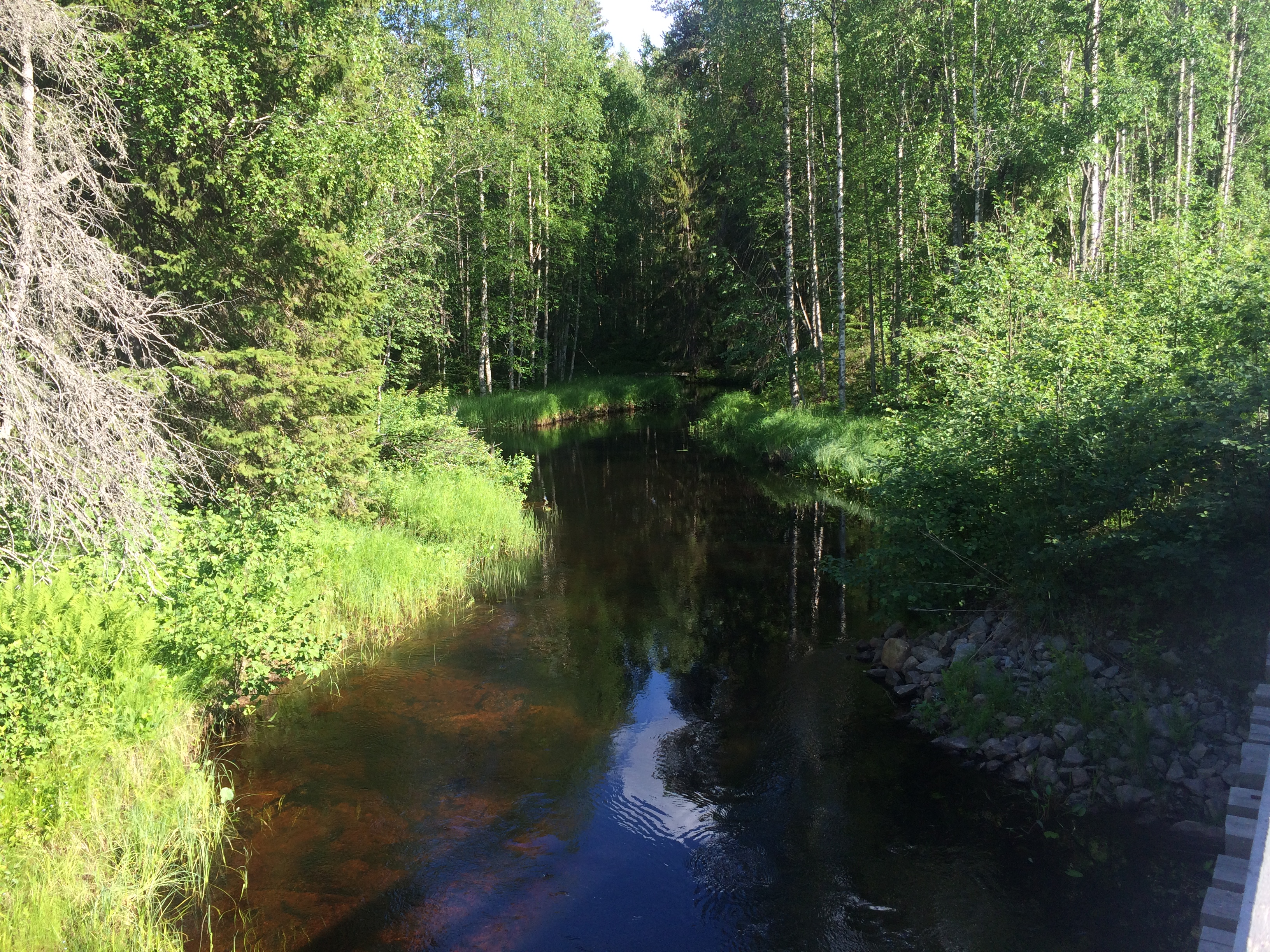 Вотто